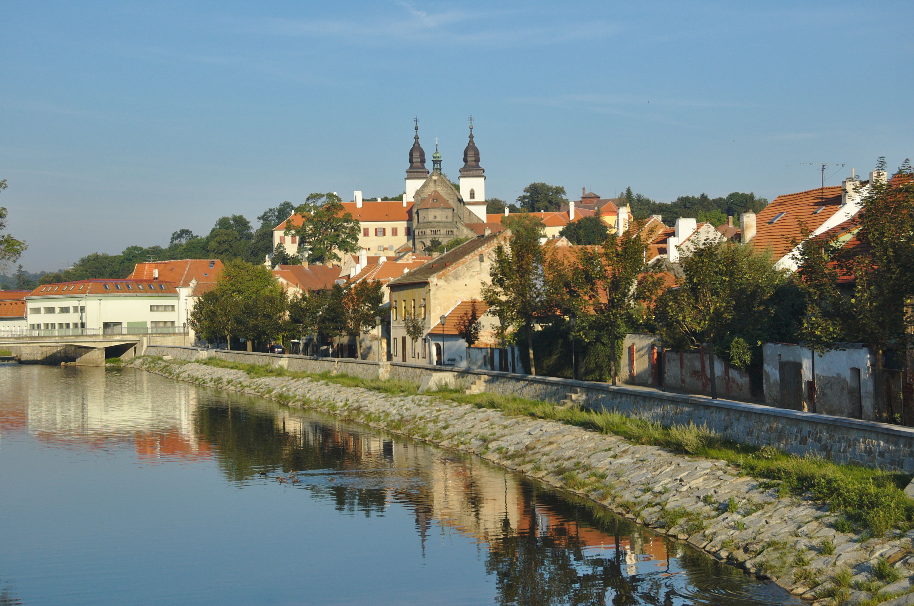 Židovská čtvrt - pohled z lávky plk. Jindřicha Svobody, Třebíč